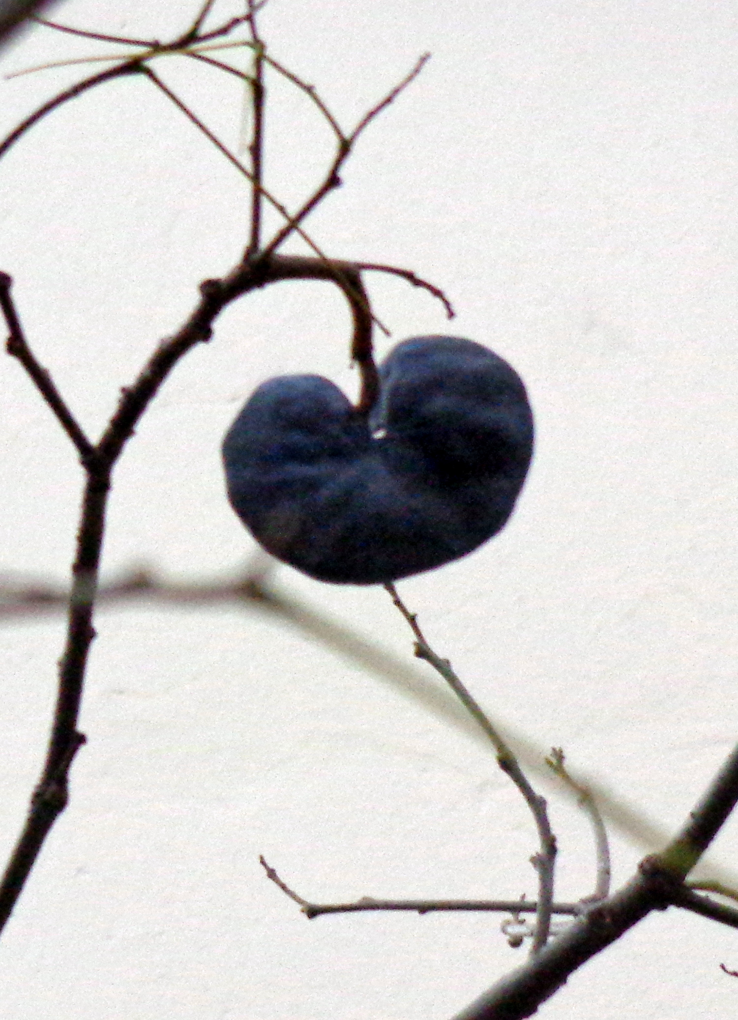 Fruto de Enterolobium contortisiliquum o Pacará, llamado "oreja de negro". En esquina de Puan y Fernández Moreno, barrio Parque Chacabuco, Buenos Aires, Argentina.